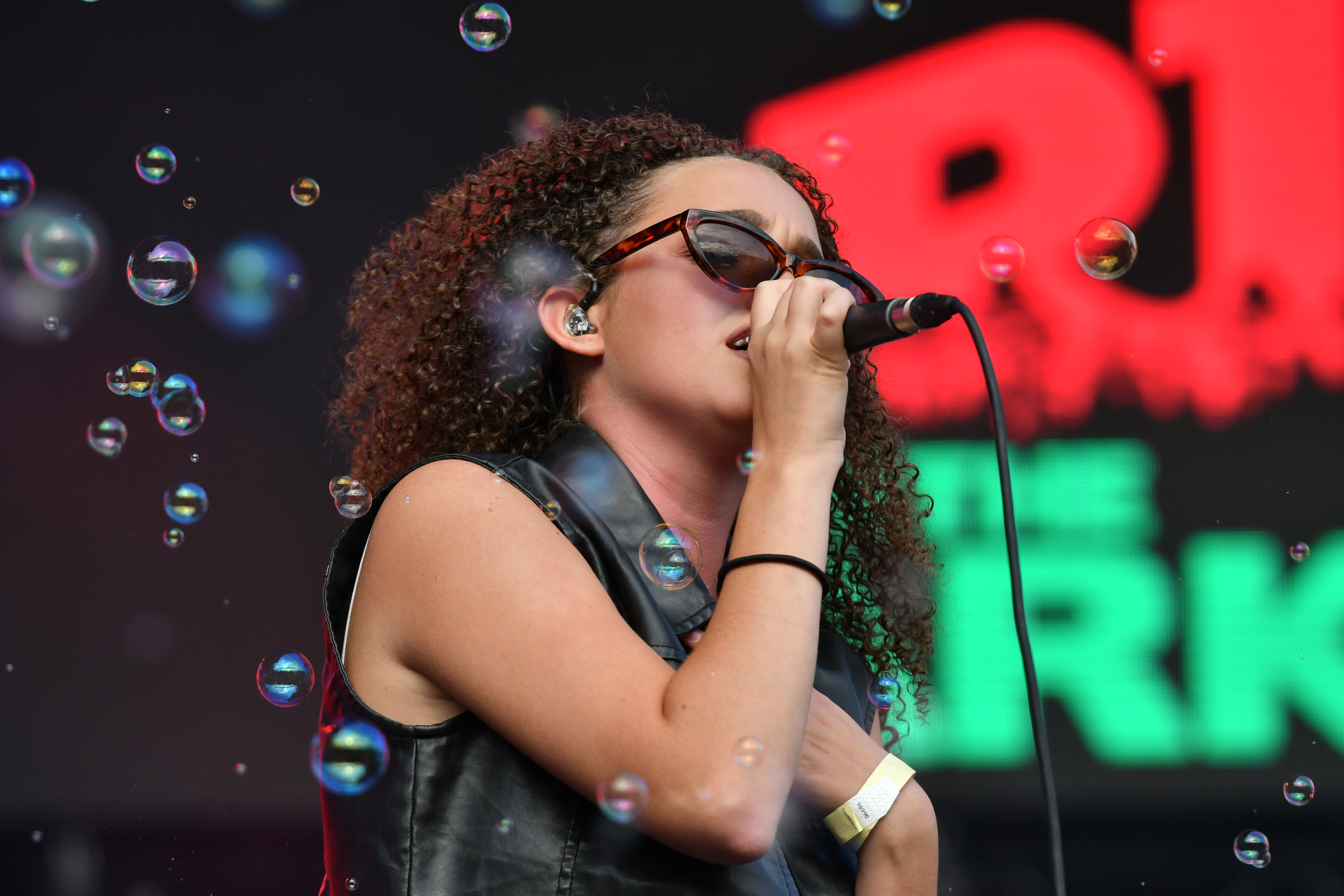 Rhys på Malmöfestivalen 2018, som del av NRJ in the Park.